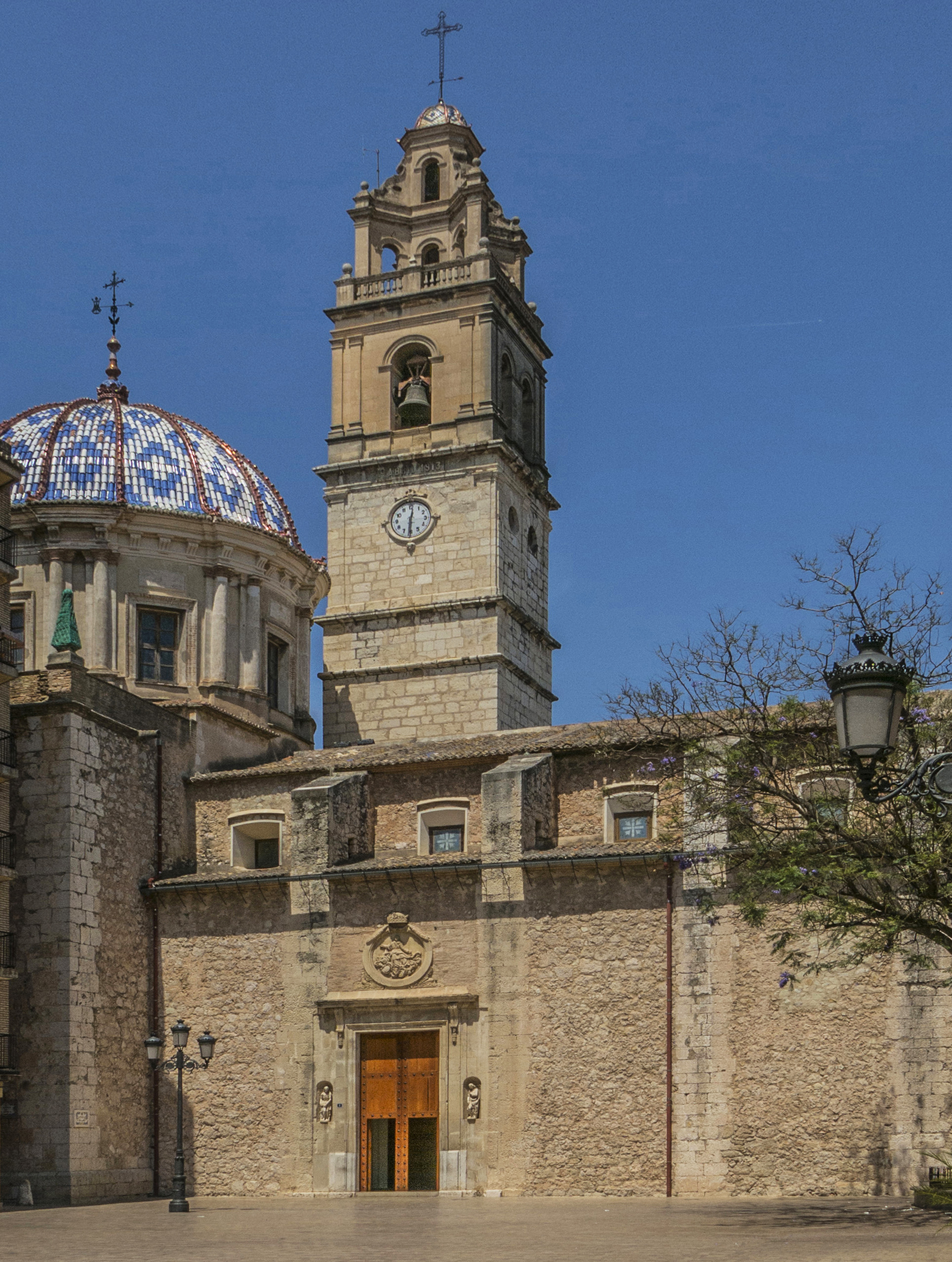 L'església està situada a la Plaça Major de Carcaixent. L'edifici data de 1434, gòtic, ampliat i reformat en diferents ocasions. Bé de Rellevància Local segons la Disposició Addicional Quinta de la Llei 5/2007, de 9 de febrer, de la Generalitat, de modificació de la Llei 4/1998, d'11 de juny, del Patrimoni Cultural Valencià (DOCV Núm. 5.449 / 13.02.2007).